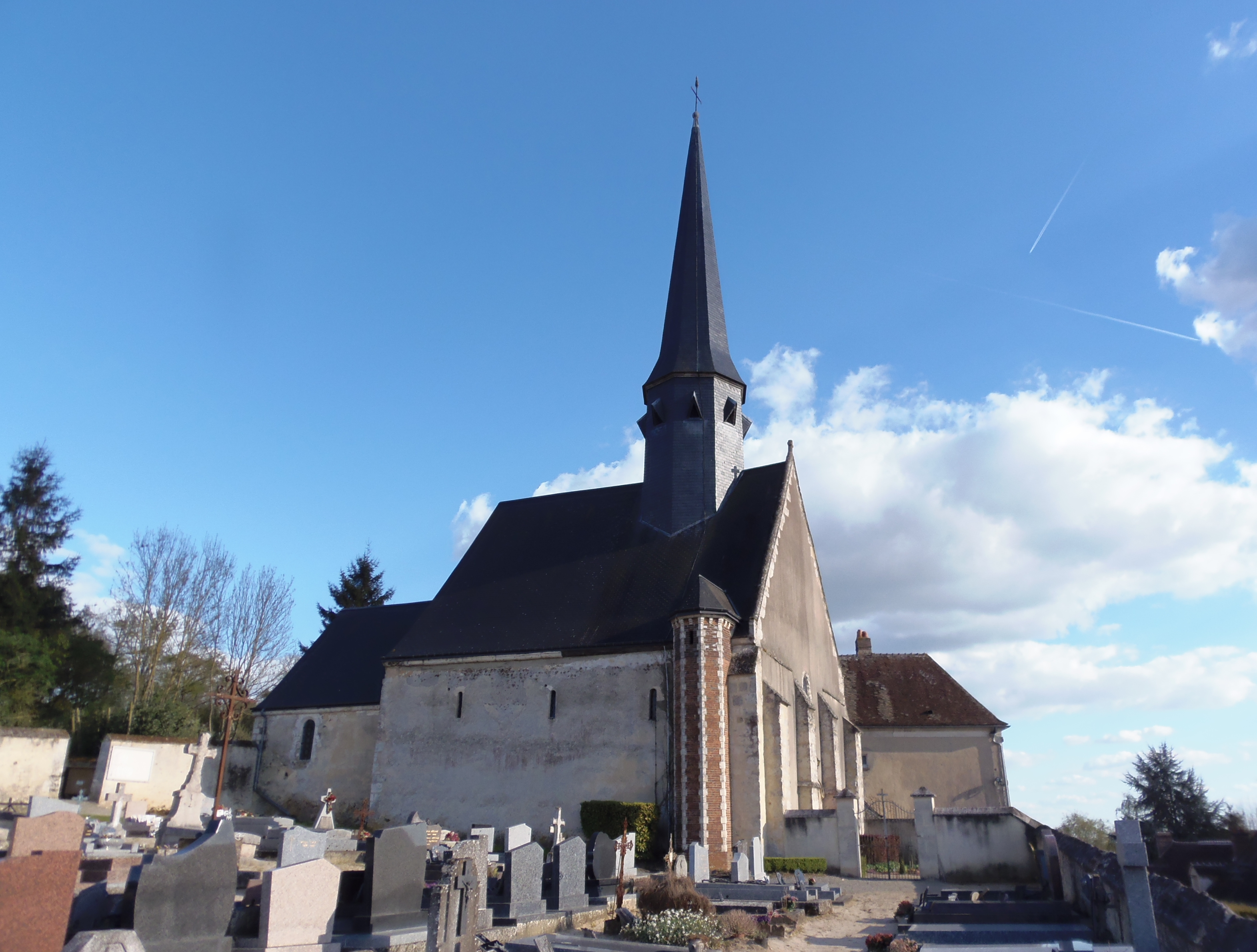 Saint-Pierre-la-Bruyère (Normandie, France). L'église Saint-Pierre.